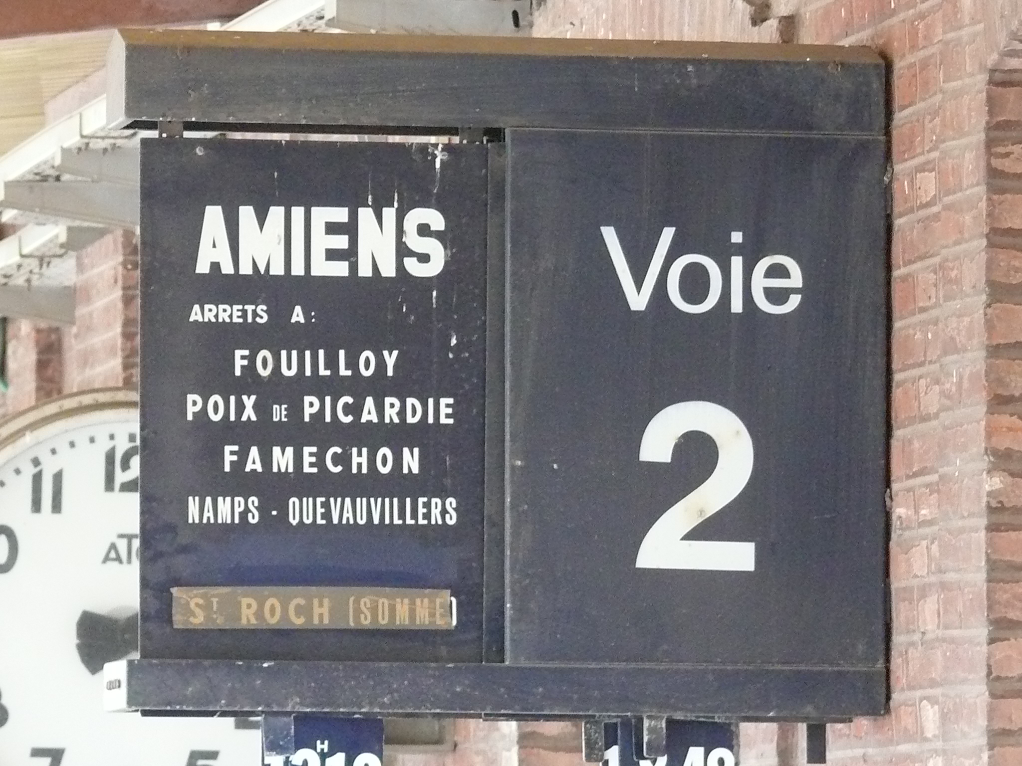 Anciens panneaux de quai de la Gare d'Abancourt